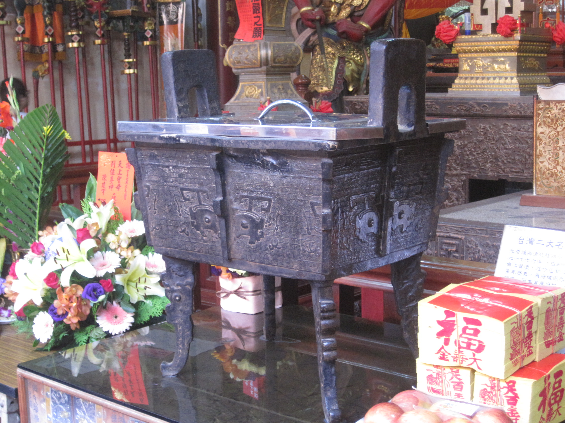 臺南大天后宮蔣公鼎，清朝臺灣府知府蔣元樞所獻。